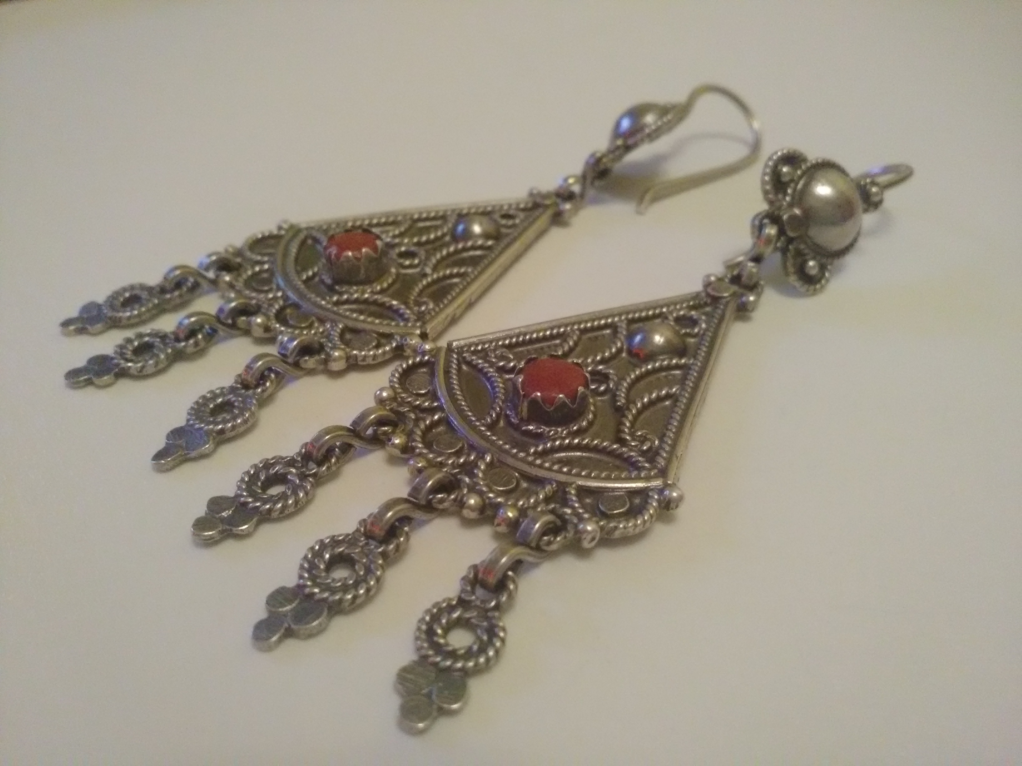 Bijoux Chaoui d'Algérie This is an image of Cultural Fashion or Adornment from Algeria